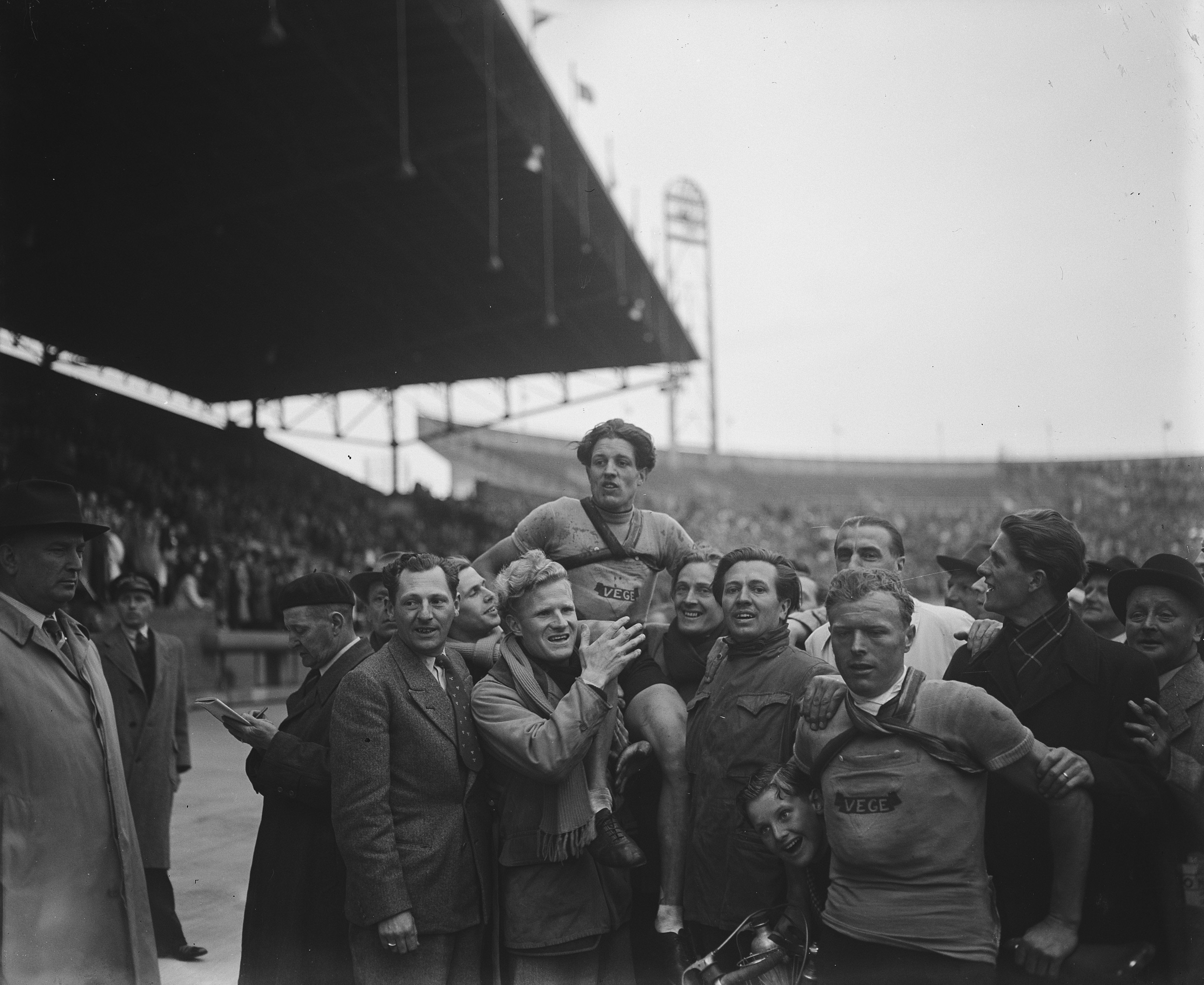 Collectie / Archief : Fotocollectie Anefo Reportage / Serie : [ onbekend ] Beschrijving : Ronde van Nederland. Van Beek op schouders Datum : 2 mei 1948 Trefwoorden : ronden, schouders Fotograaf : Snikkers, […] / Anefo Auteursrechthebbende : Nationaal Archief Materiaalsoort : Glasnegatief Nummer archiefinventaris : bekijk toegang 2.24.01.09 Bestanddeelnummer : 902-7222